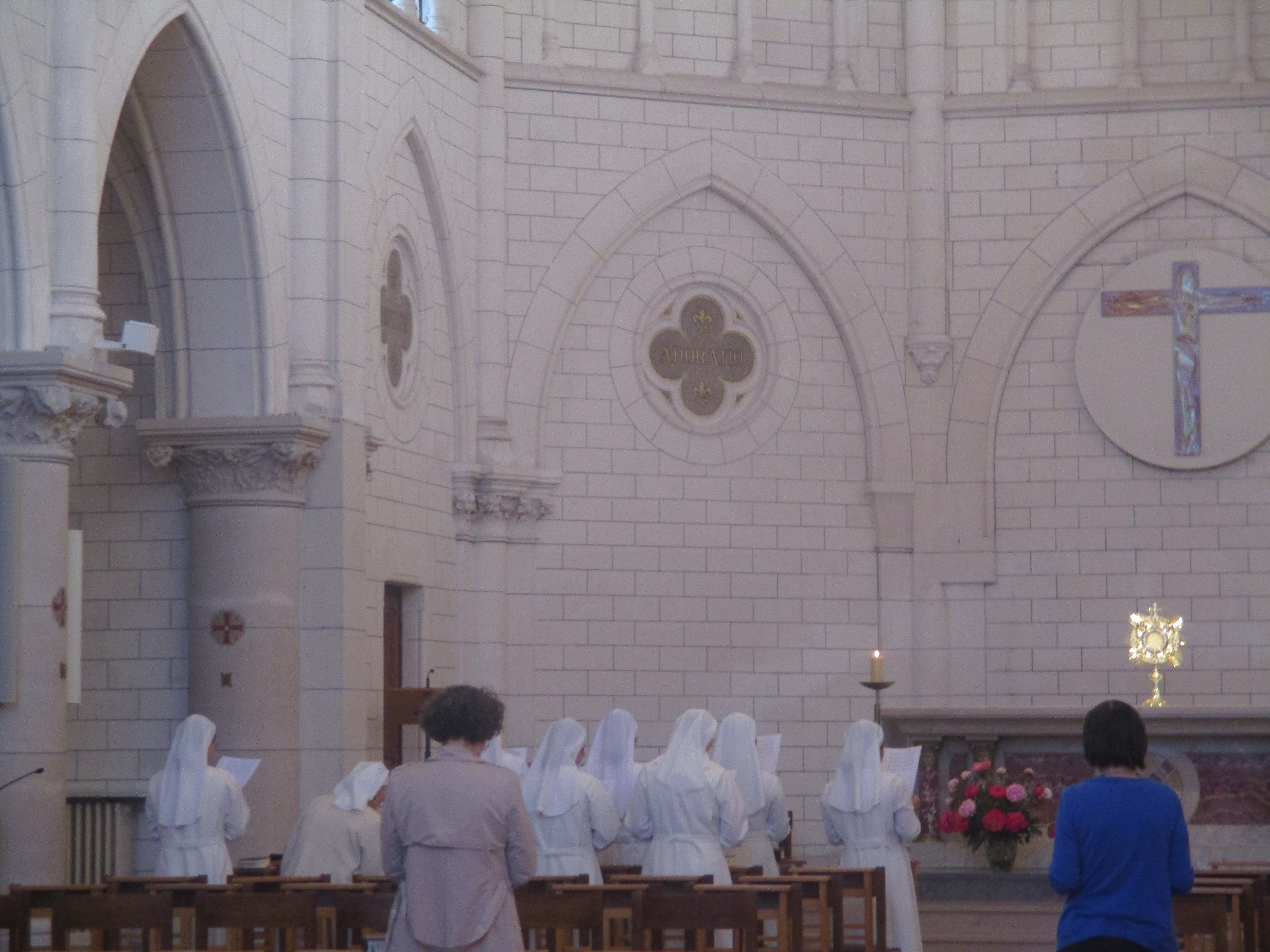 Servantes du Très-Saint-Sacrement dans leur chapelle de la rue Cortambert à Paris XVIe.